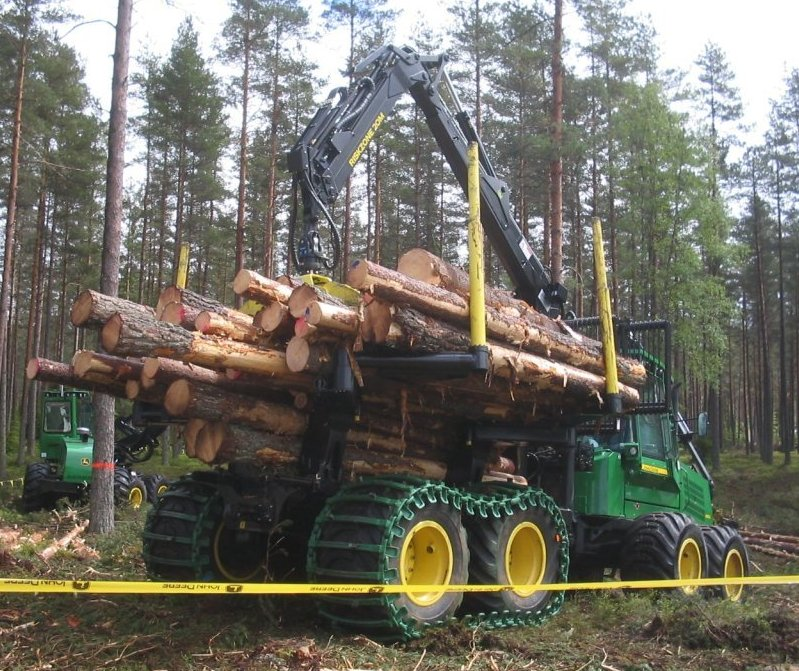 Forstlicher Rückezug (Forwarder), Vorführung auf der Elmia Wood 2005